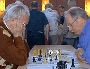 Friedrich Löchner, links im Bild beim Fernschachtreffen 2000 in Bad Neustadt (Saale) bei seiner Partie gegen Alfred Kotlar (mit den weißen Steinen), den Sieger der Gruppe B.